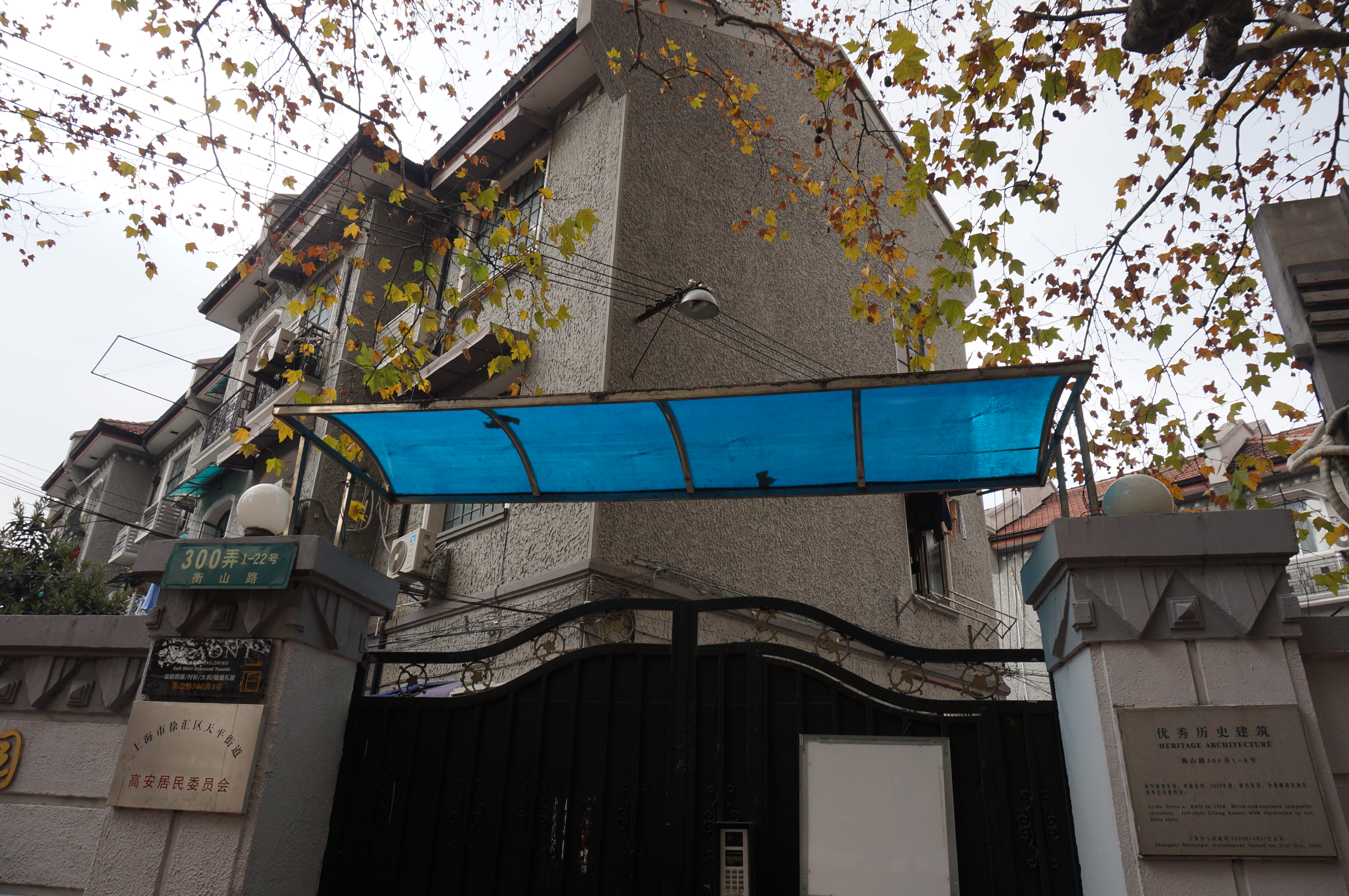 上海丽波花园